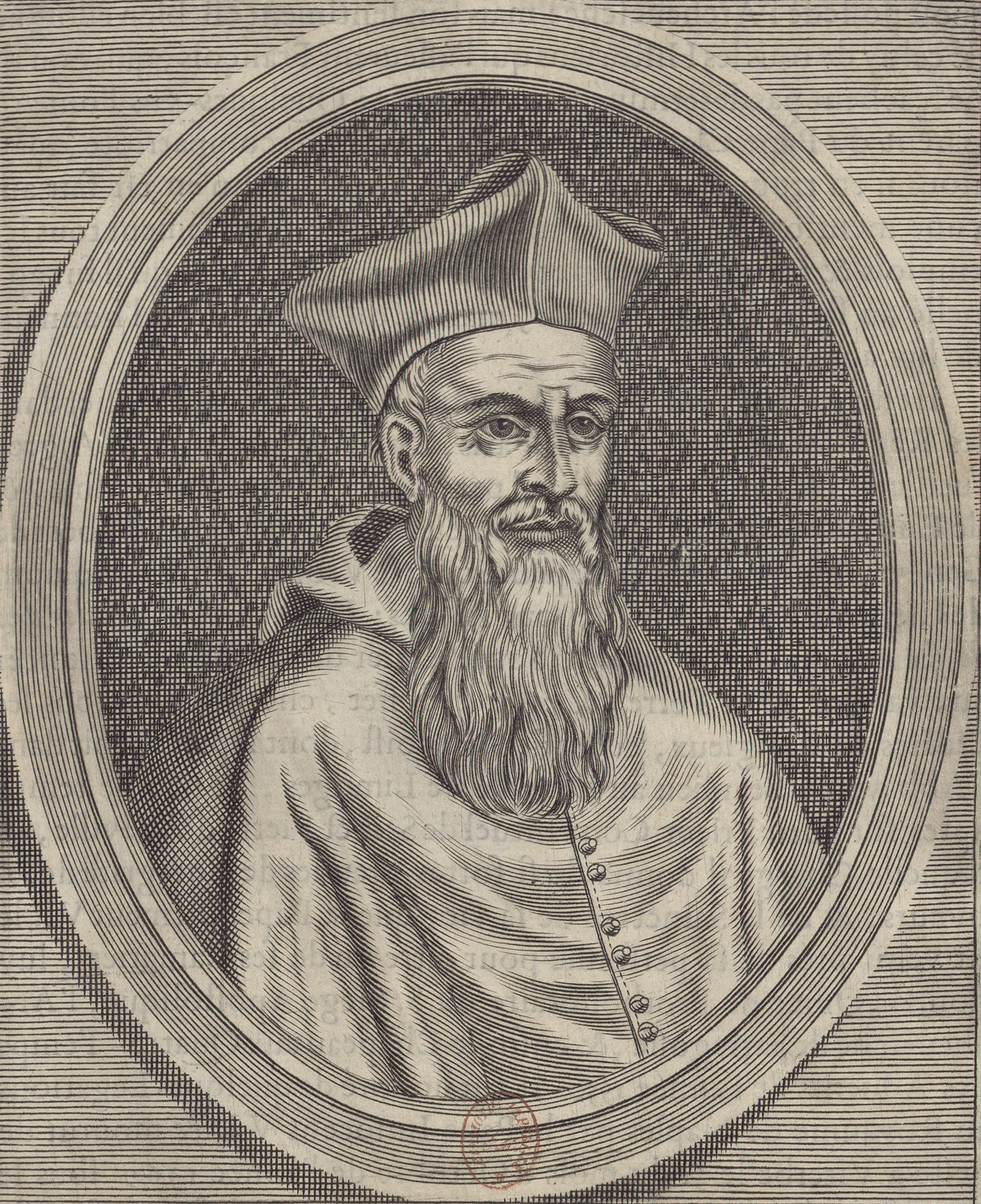 Portraits de Guillaume d'Aigrefeuille (1326-1369), l'aîné, cardinal